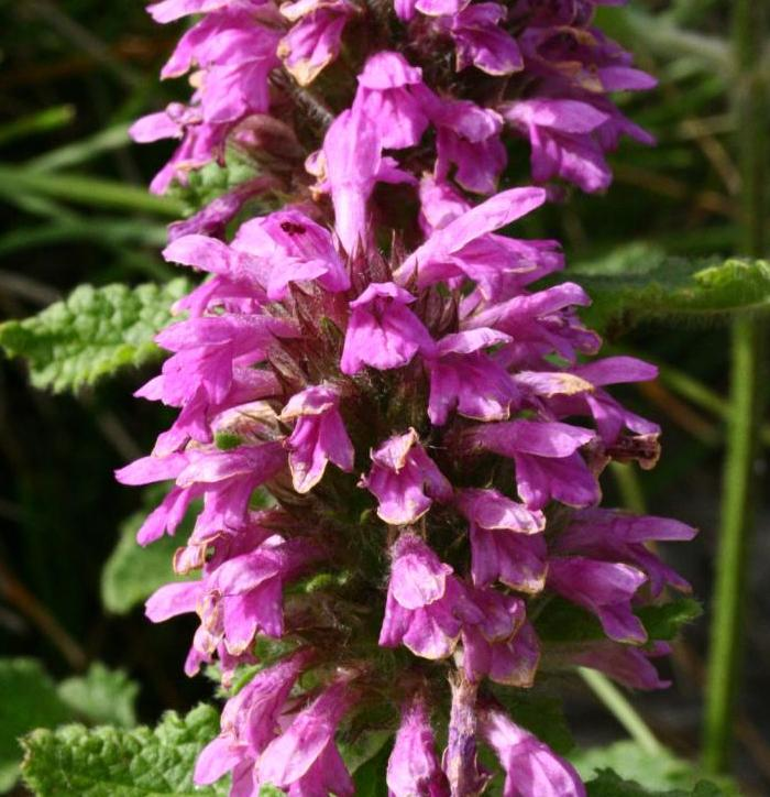 Stachys pradica